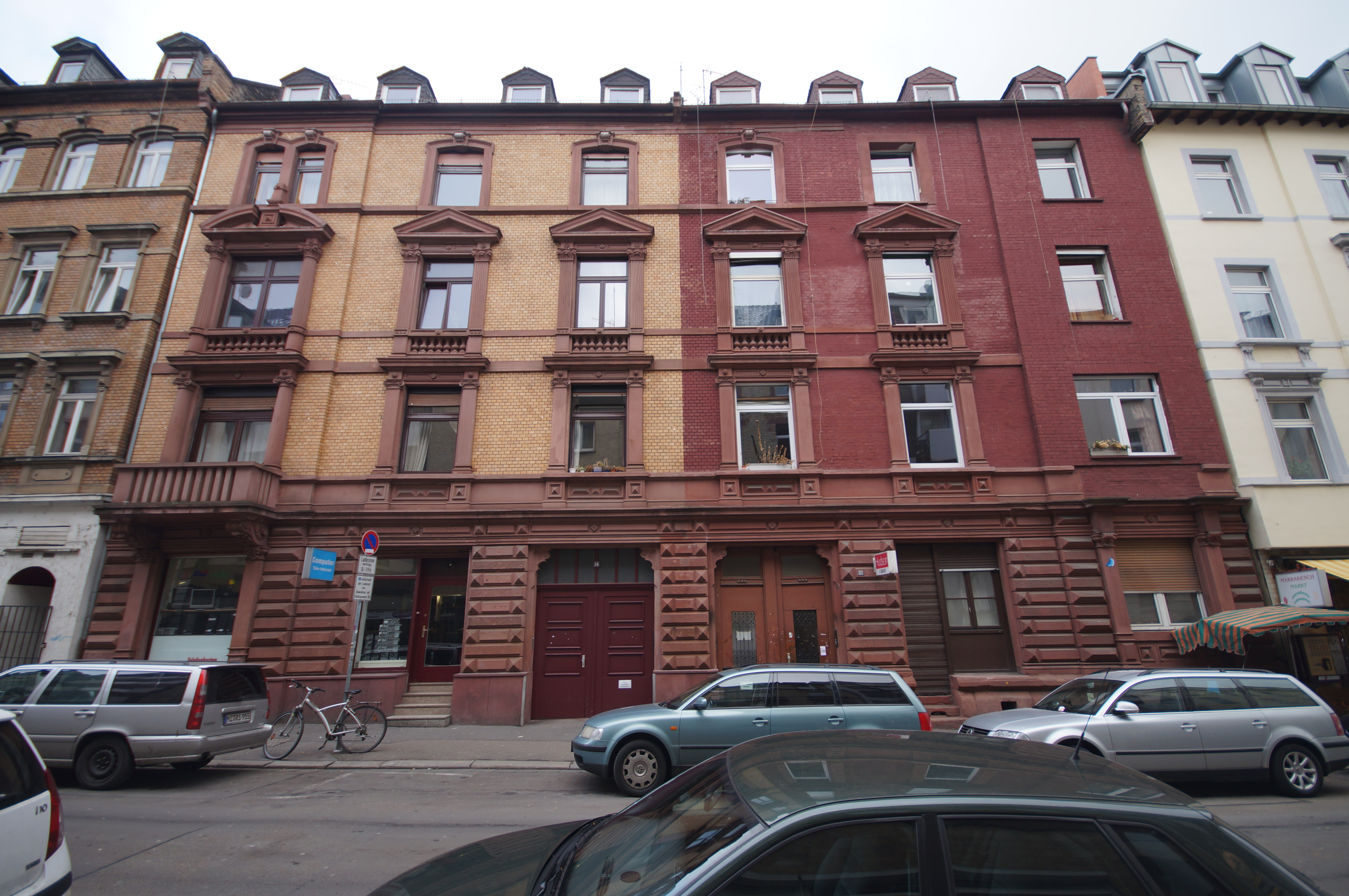 Die Fassaden der Hausnummern 34 und 32 in der Zanggasse in Mainz-Altstadt in der Denkmalzone Zanggasse